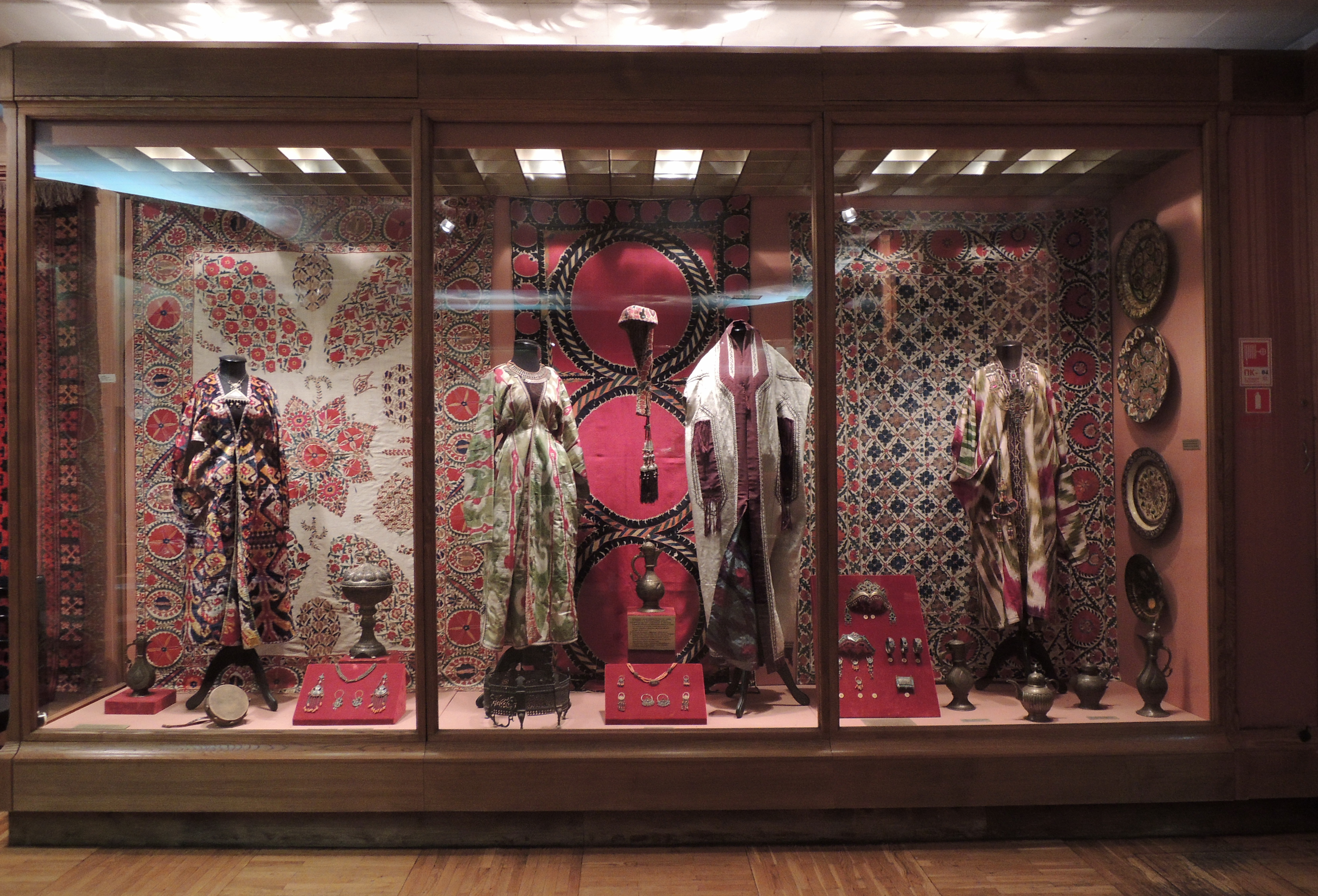 Государственный музей Востока (Москва)